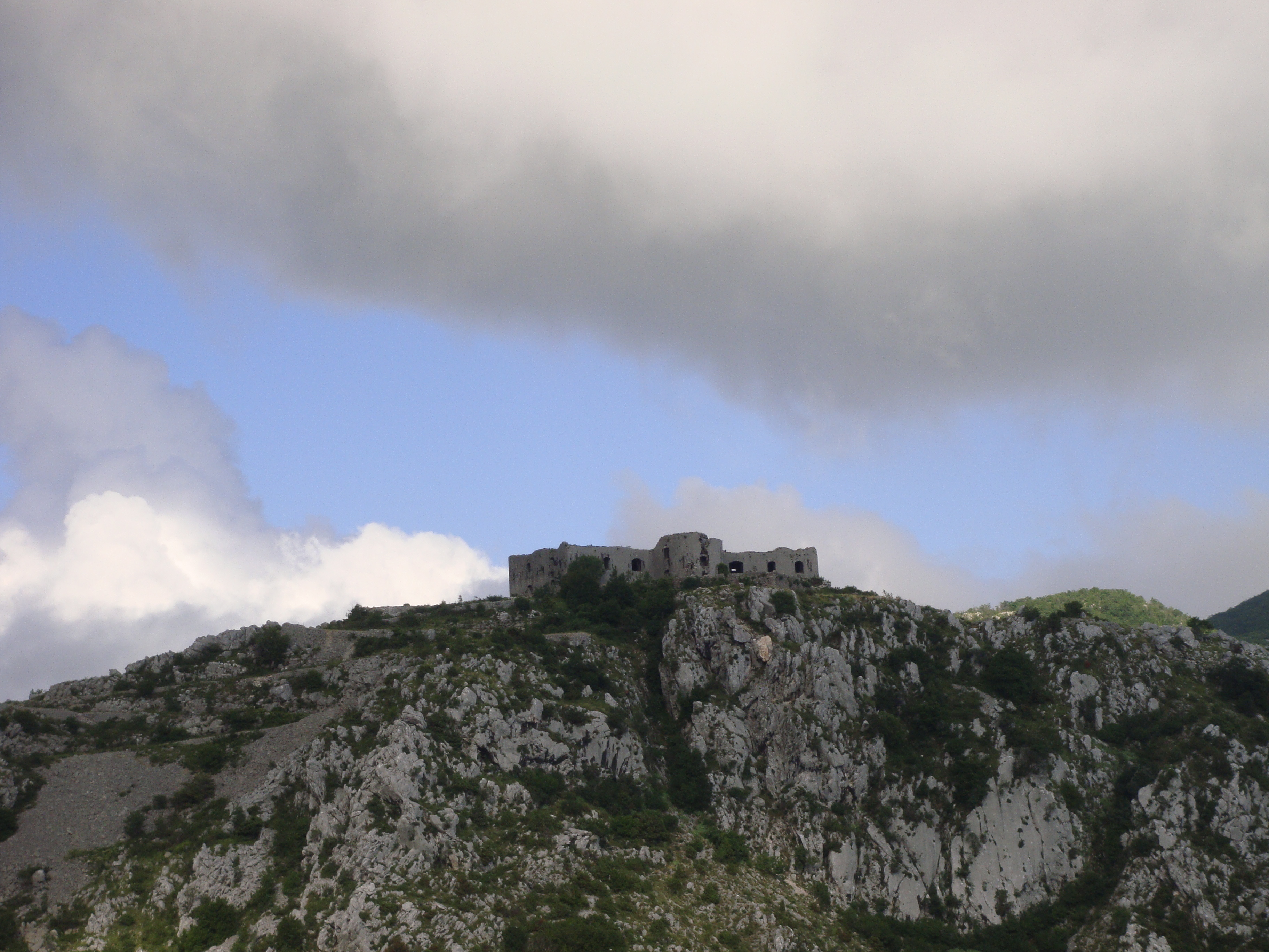 kosmac